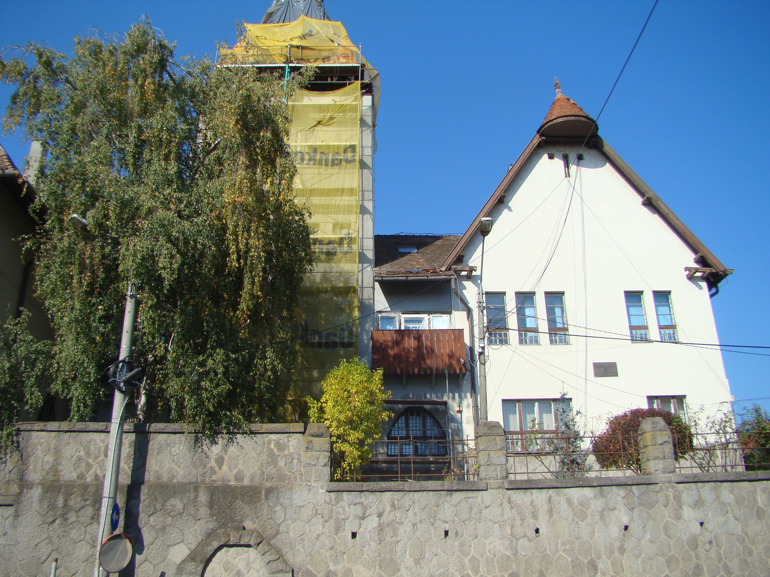 Fostul ansamblu al administrației Uzinelor Comunale, azi R. A. Aquaserv și S.C. Energomur S.A., municipiul Târgu Mureș Str. Kos Karoly 1A și 1 B 1910 - 1913